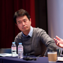 피키캐스트 설립자 장윤석